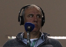 רפי אוסמו (הגדול)